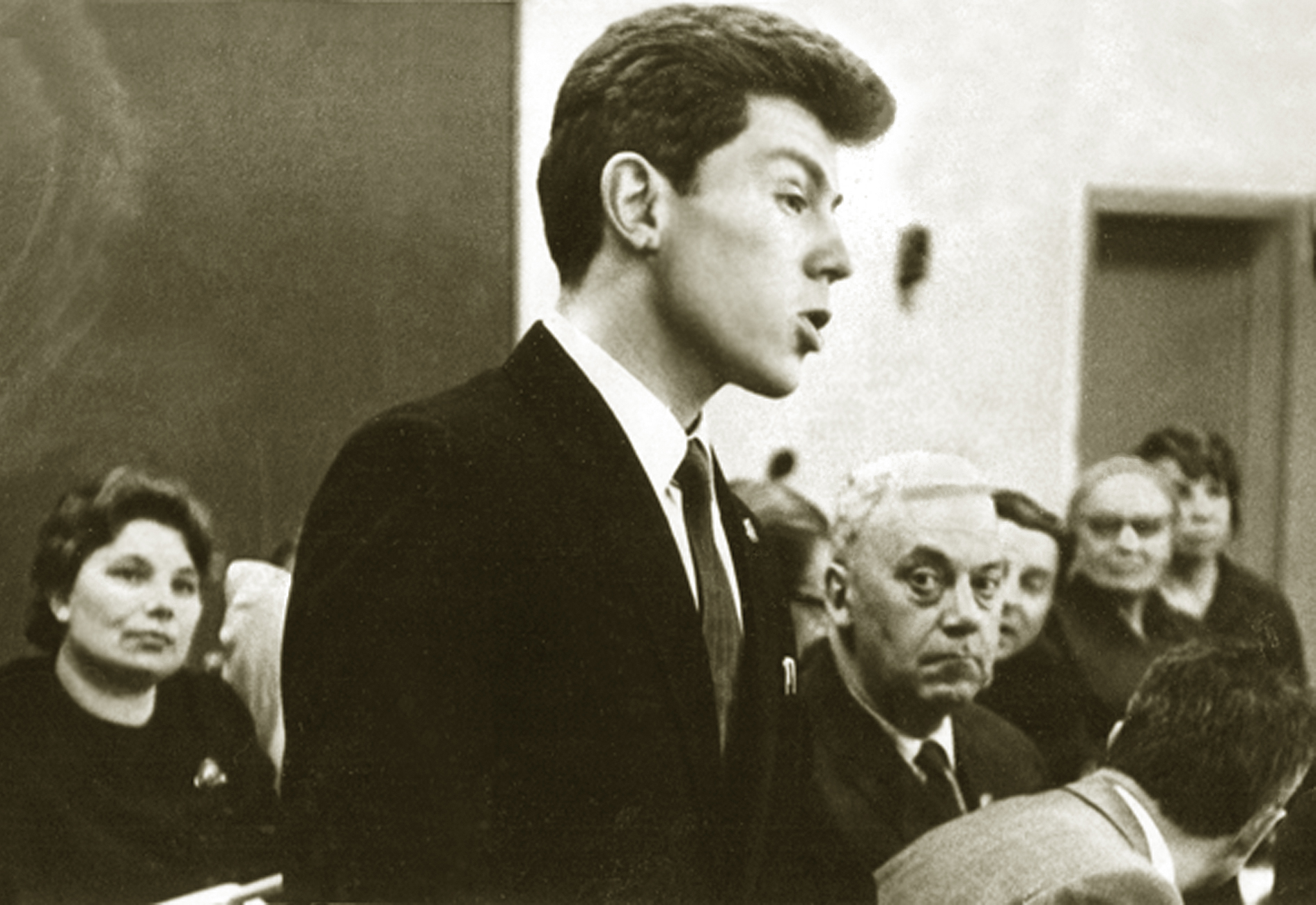 Профессор Аркадий Горенштейн. Выступление на студенческой научной конференции